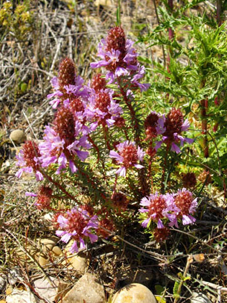 Coris monspeliensis subsp. fontqueri